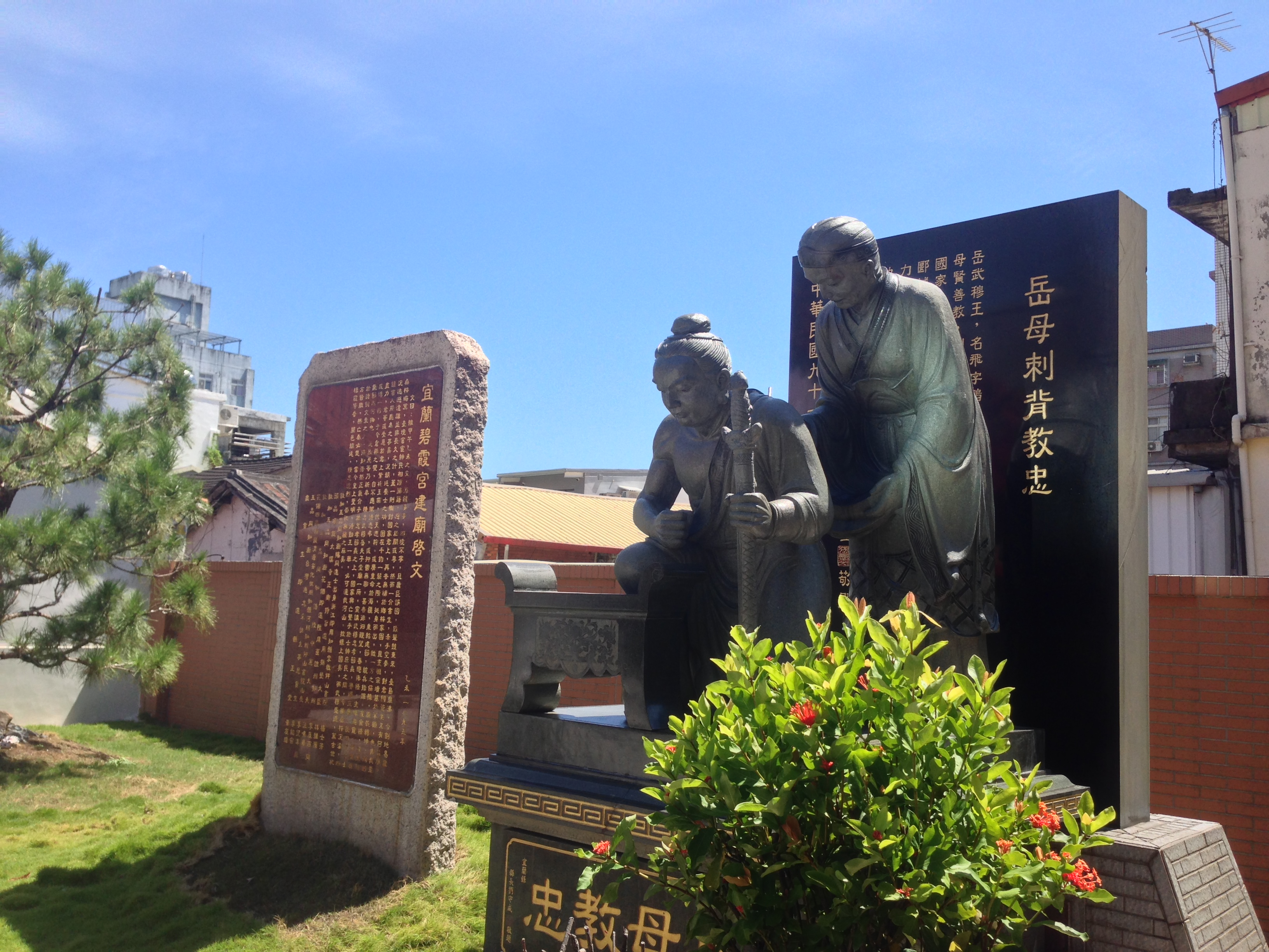 中文（台灣）: 宜蘭碧霞宮岳母刺字銅像